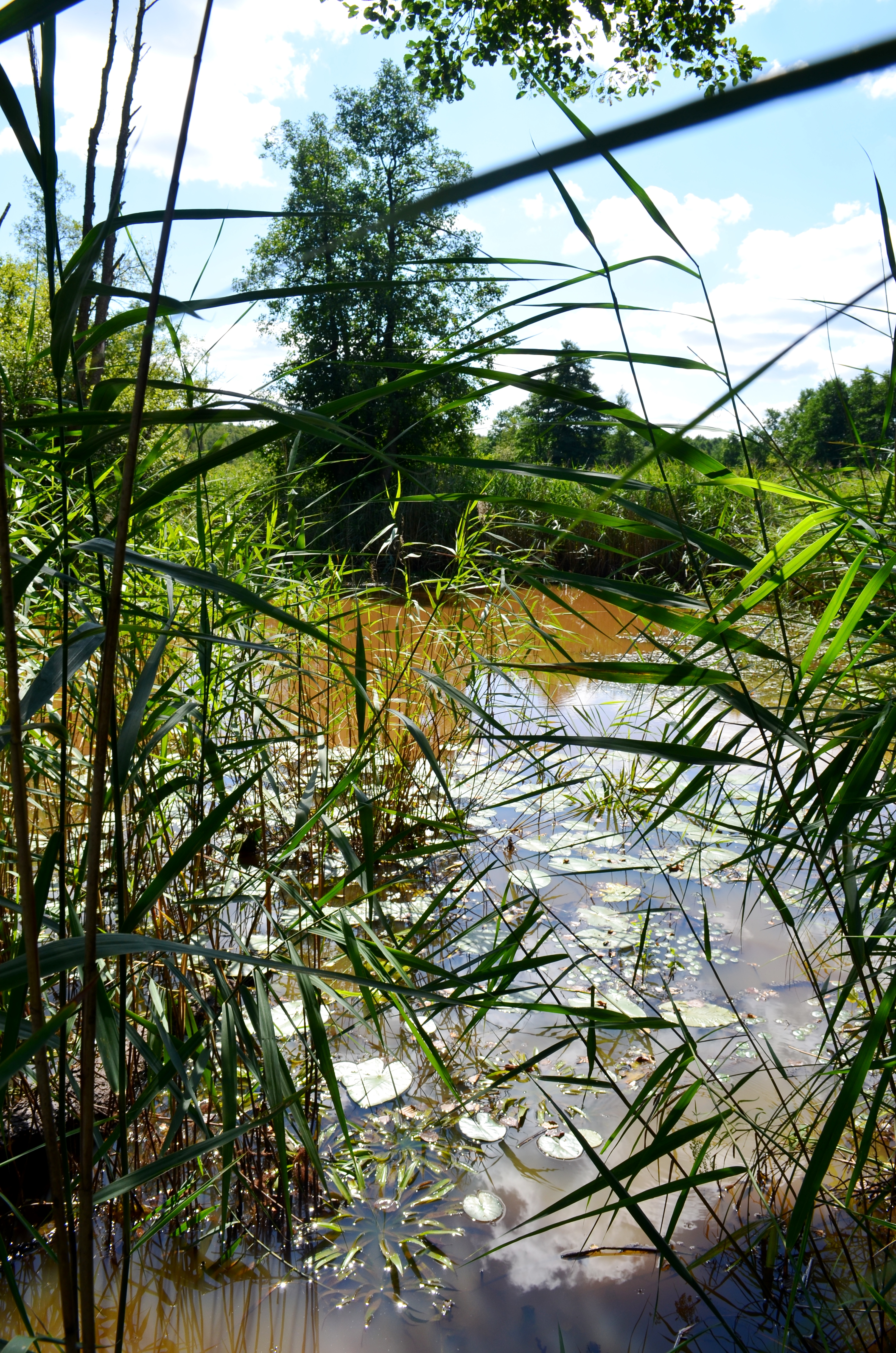 Katros upė nuo Pogarendos pusės, Varėnos raj.